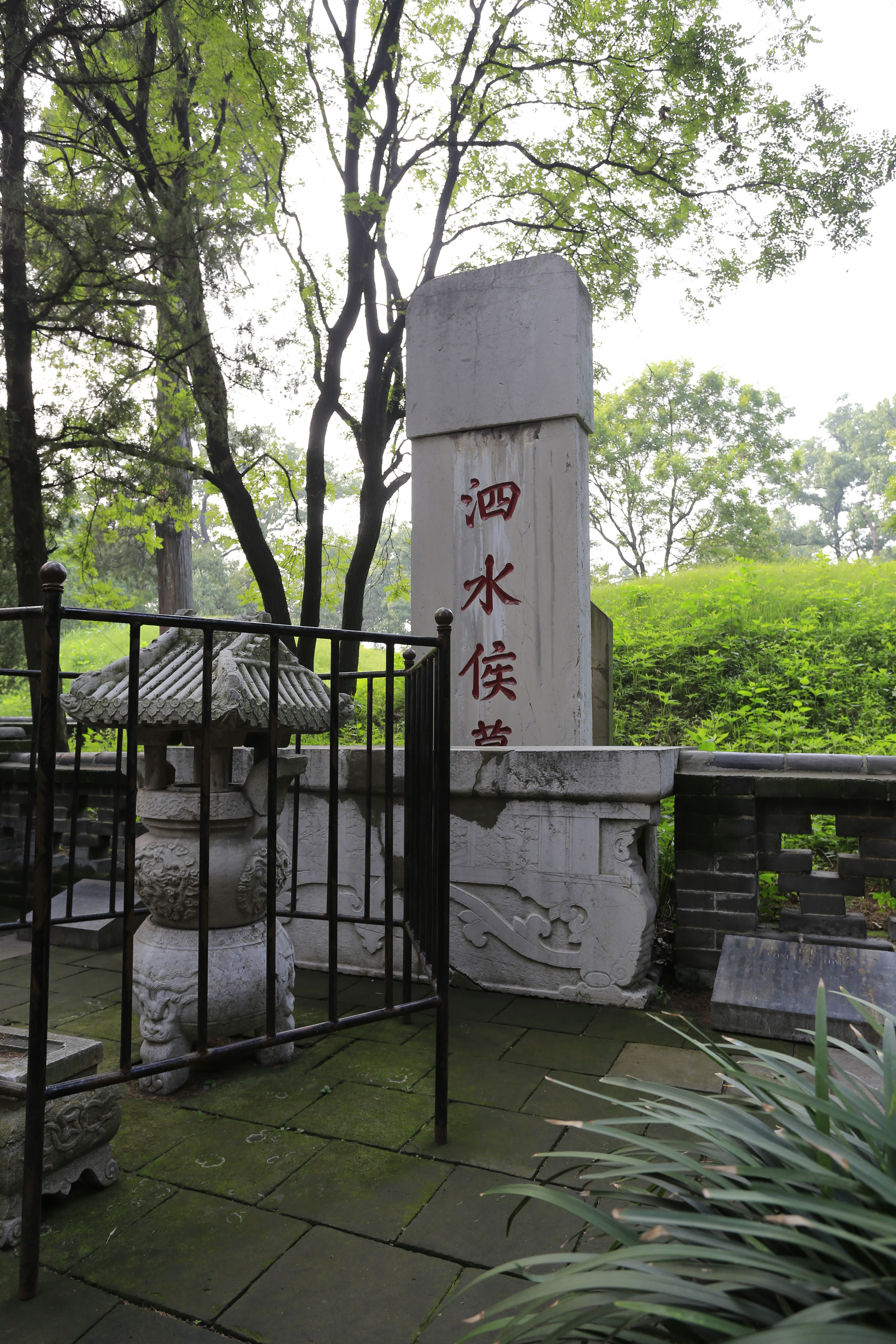 曲阜孔林—— 孔鲤墓